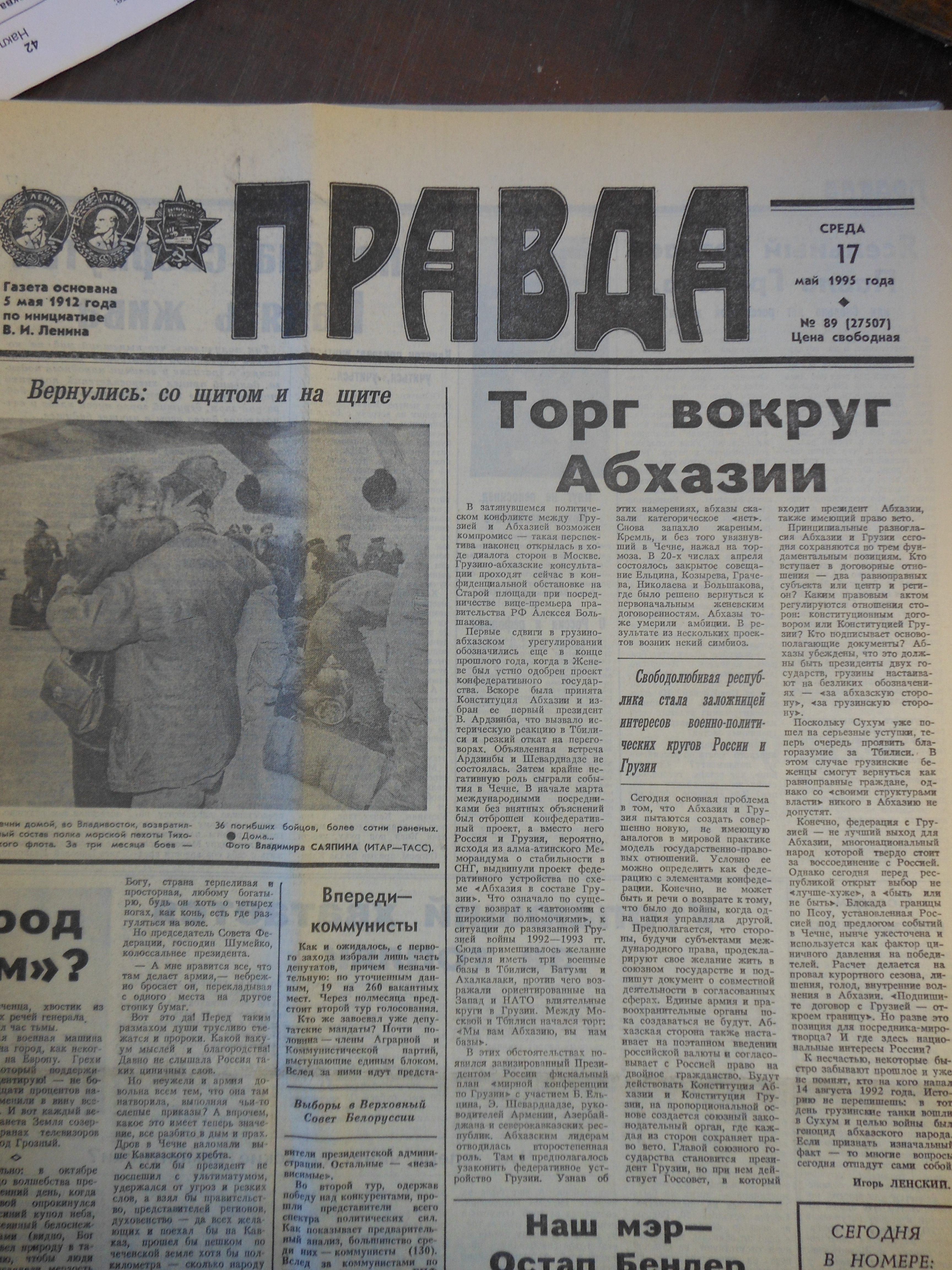 Статья в газете «Правда» «Торг вокруг Абхазии»